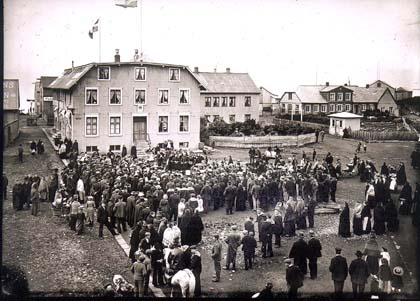 A Salvation Army event in Lækjartorg, Reykjavík